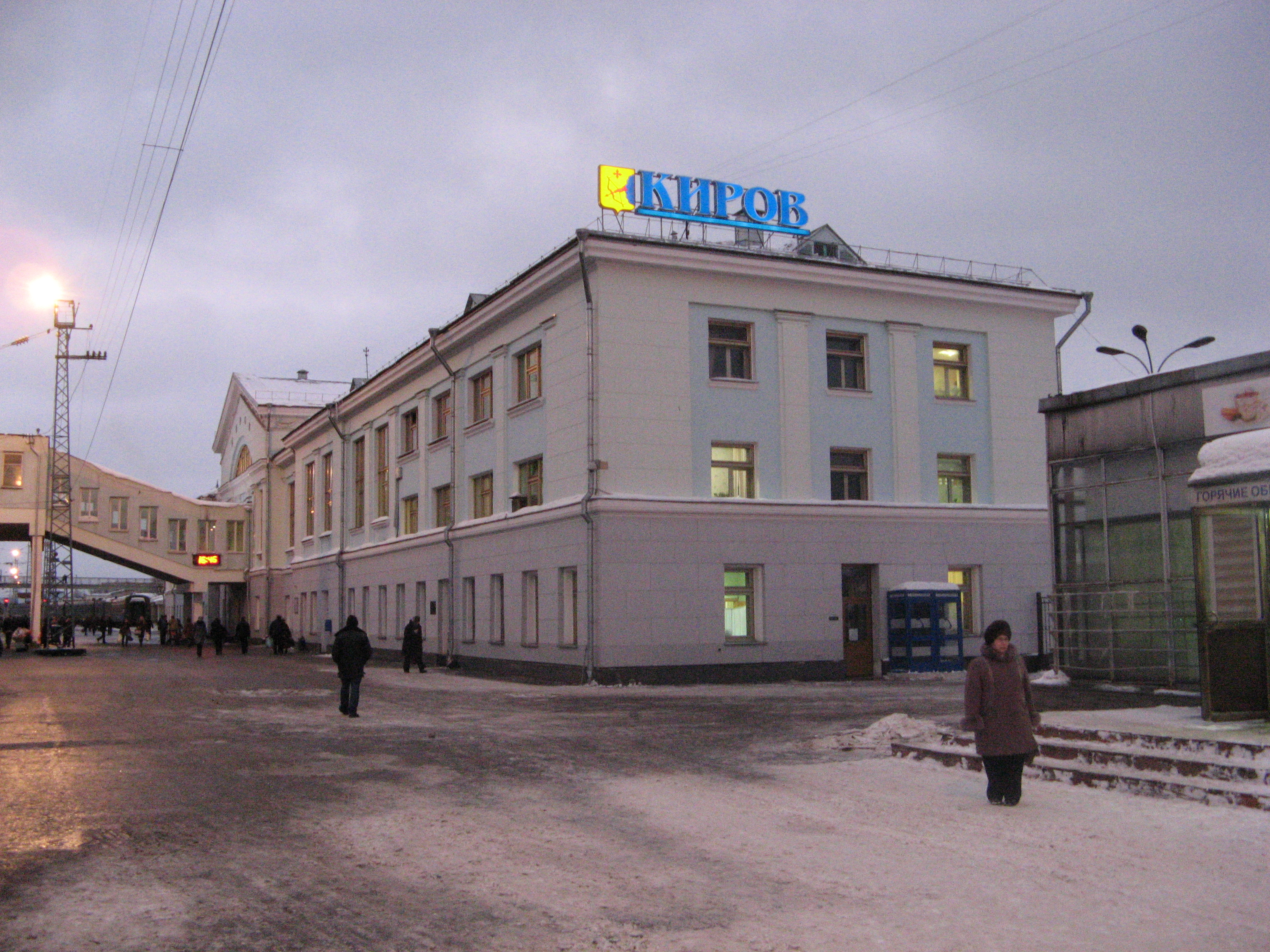 Железнодорожный вокзал Кирова зимой